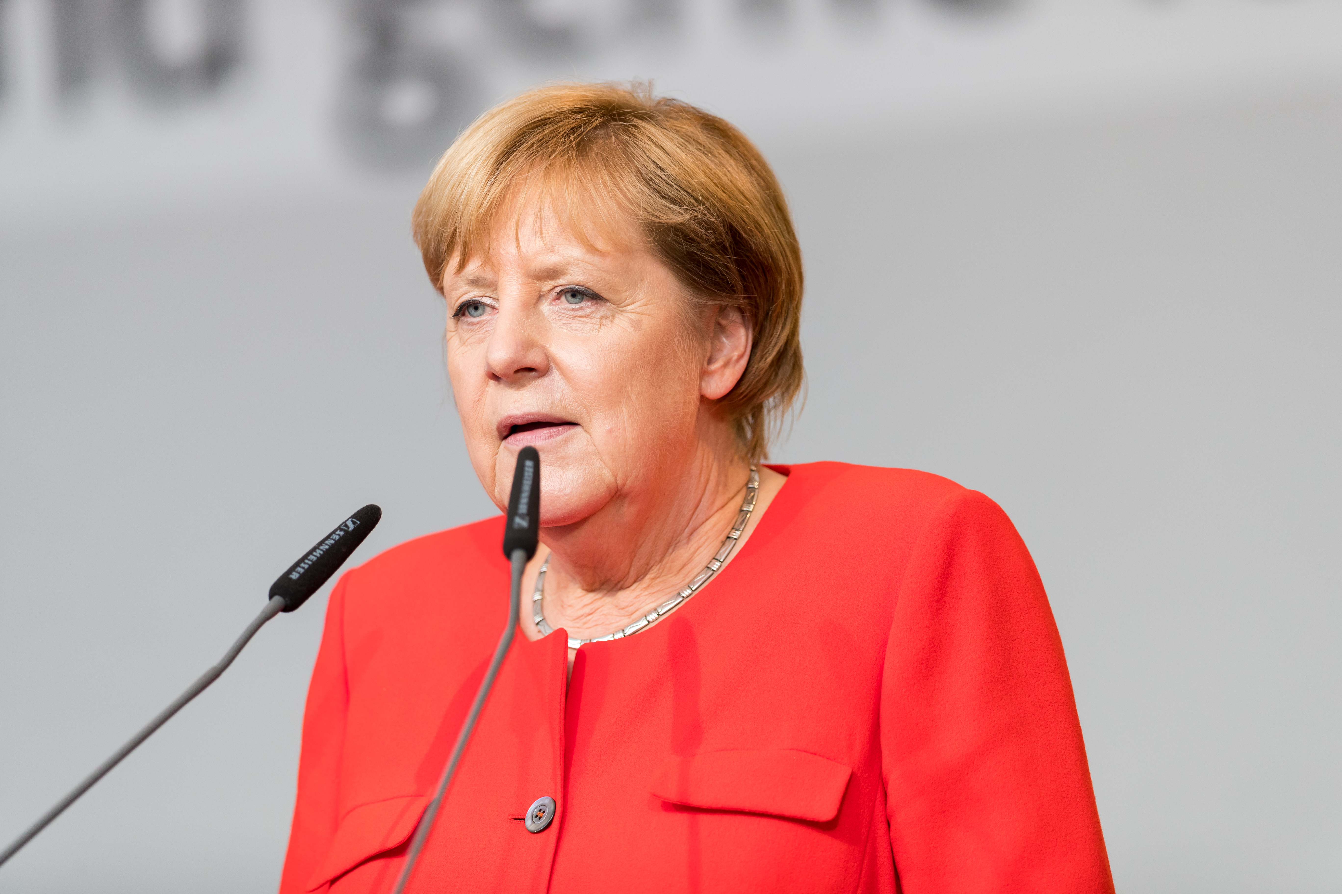 Angela Merkel during CDU Wahlkampf Heidelberg at Universitätsplatz Heidelberg, Heidelberg, Baden-Württemberg, Germany on 2017-09-05, Photo: Sven Mandel Claudia von Brauchitsch Karl Alfred Lamers Thomas Strobl